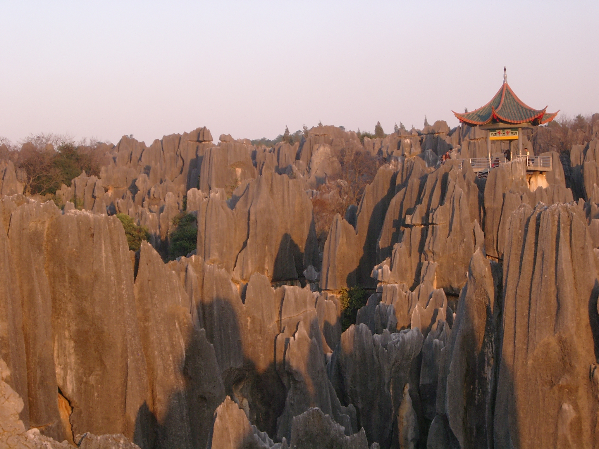 Blick über den Steinwald - Das Bild zeigt das Pavilion in der Mitte des Steinwald Parks